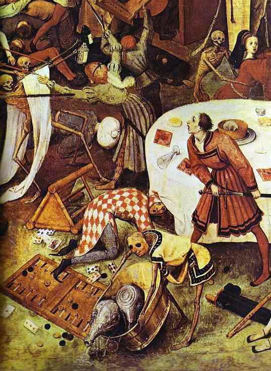 detail 2